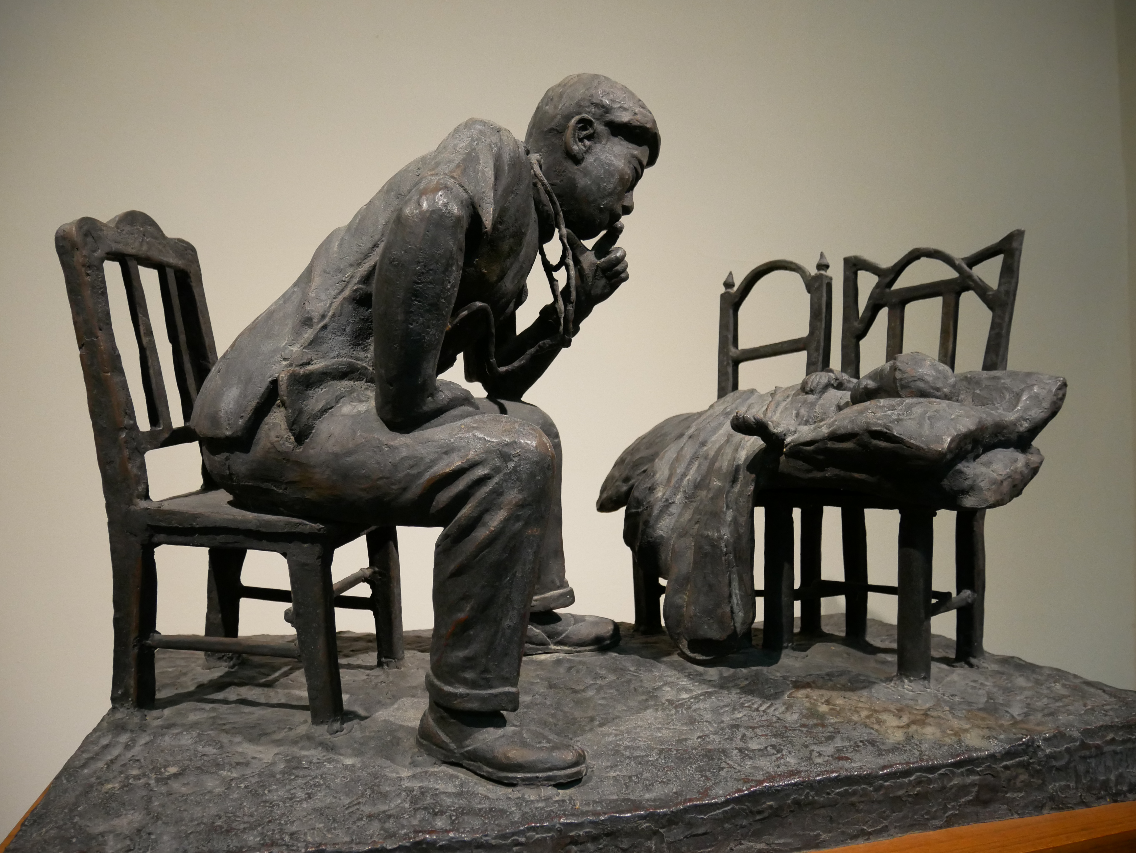 醫師之像，臺北市中正區東門次分區東門里